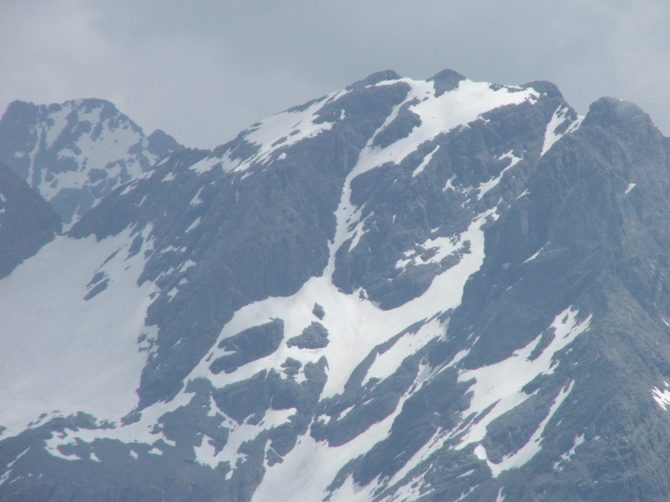 Scattata da me no copyright